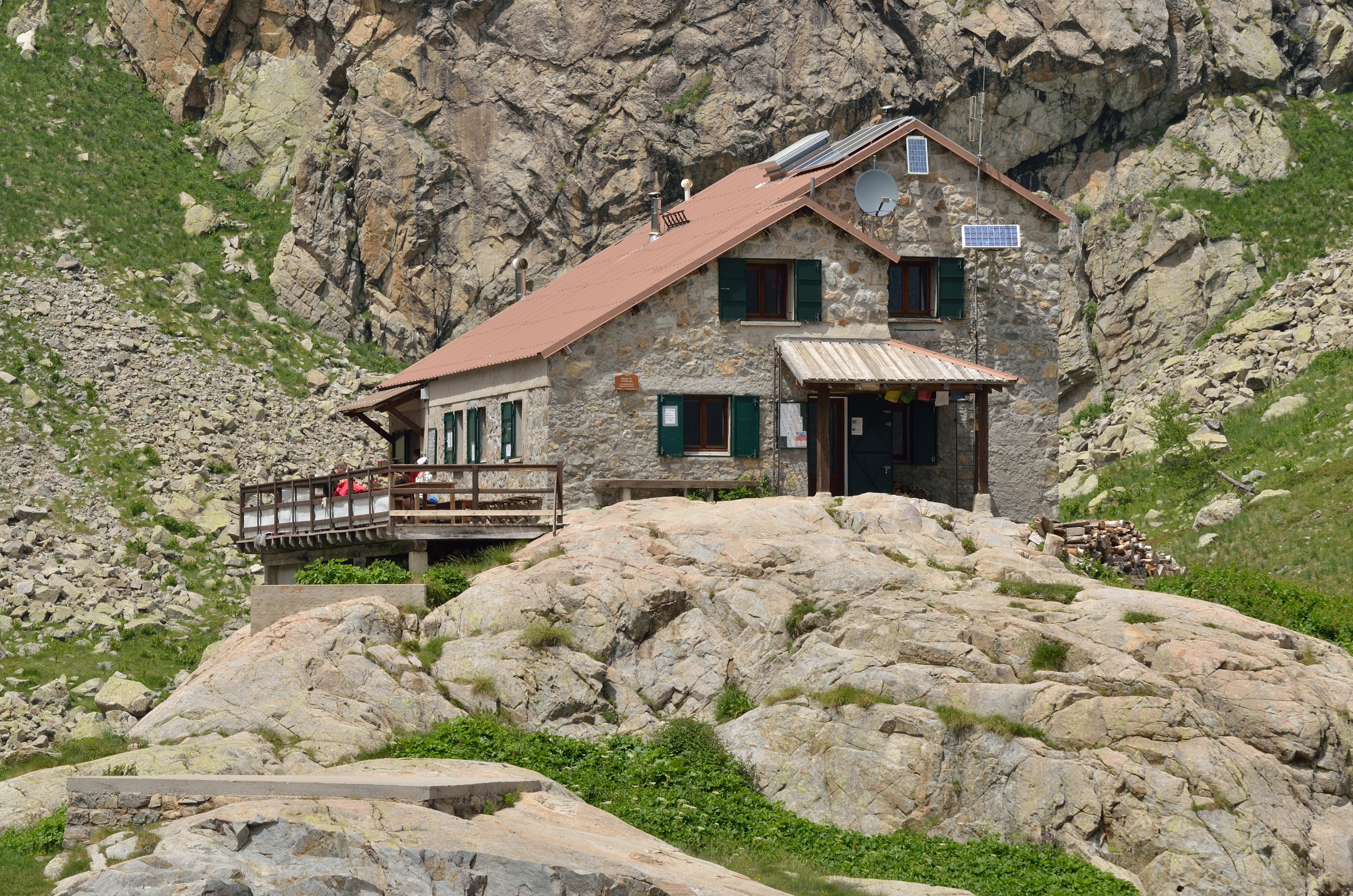 Refuge de Valmasque, dans le Parc National du Mercantour